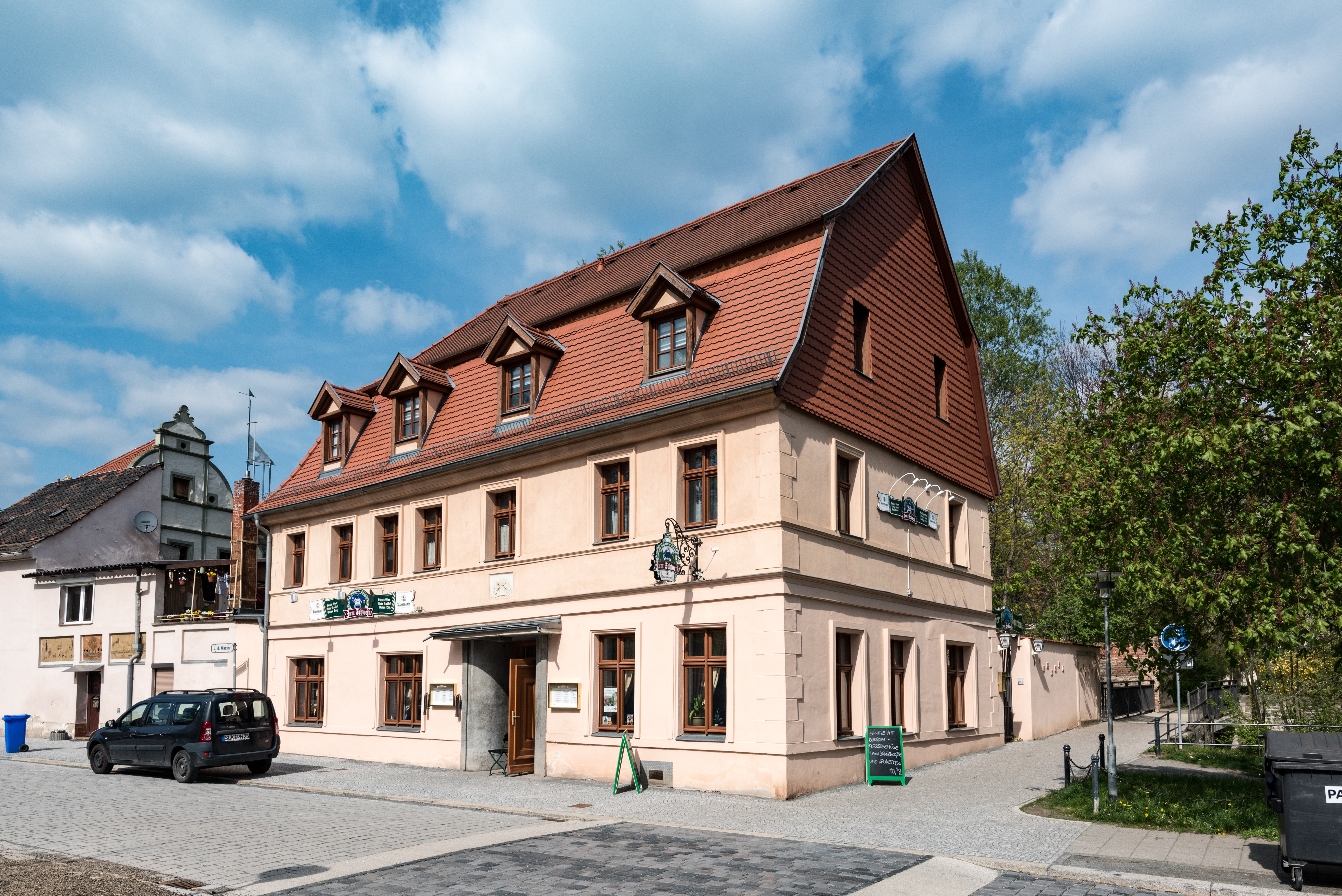 Aschersleben, Vor dem Wassertor 40